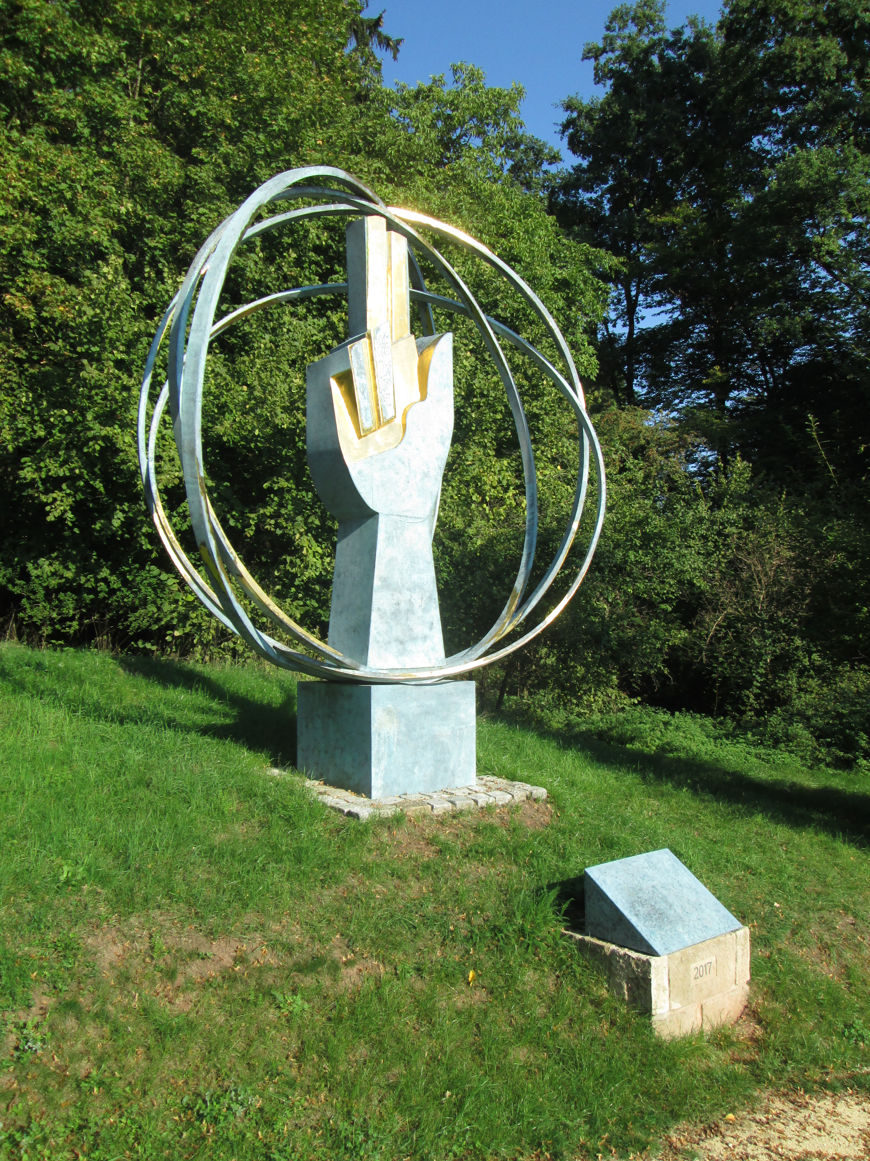 Skulptur "Salvator Segenshand" bzw. "Sphaera" bei der Salvatorkapelle Schwäbisch Gmünd, erschaffen von Rudolf Kurz